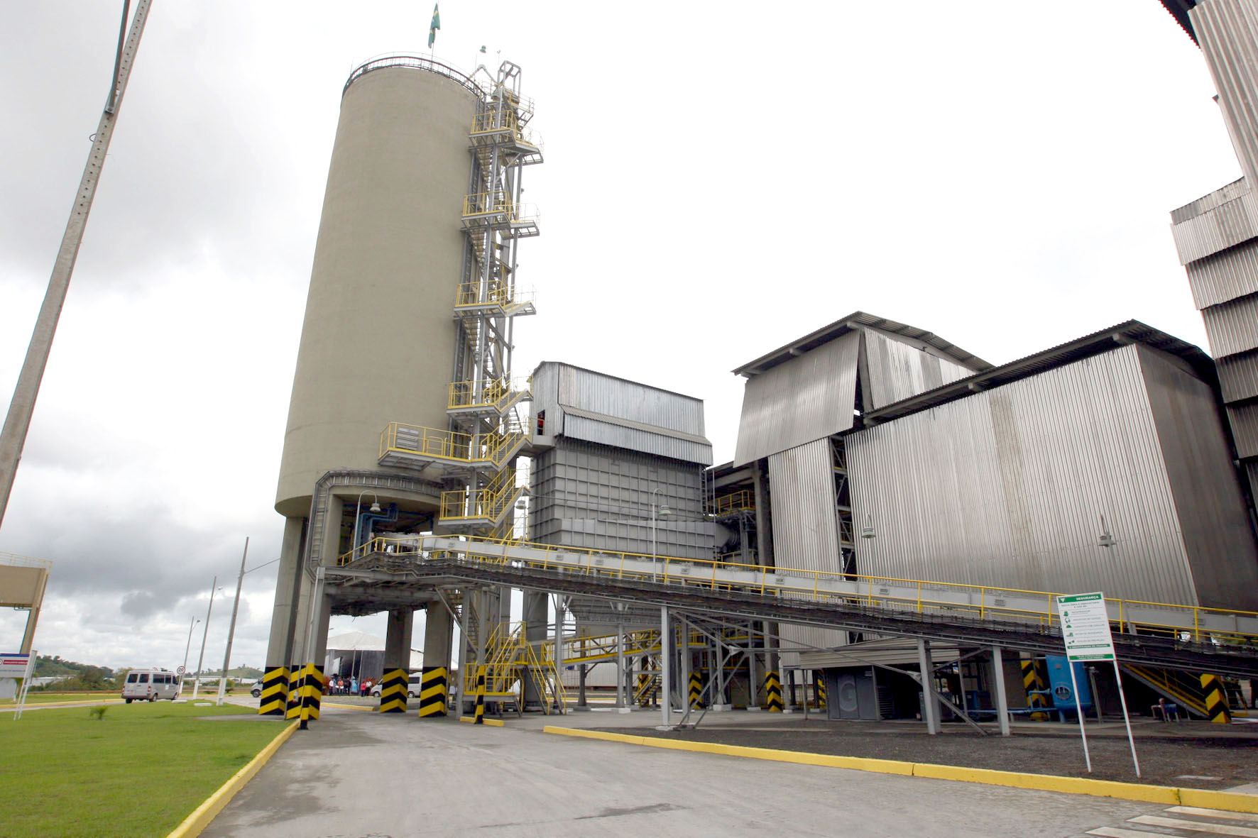 O município de Candeias, que tem um dos grandes parques industriais da Bahia, ganhou nesta terça-feira (6) mais uma empresa. Trata-se da Votorantim Cimentos, uma das dez maiores do mundo no segmento, que chegou à Bahia gerando 200 empregos diretos e indiretos. Foto: Manu Dias / AGECOM